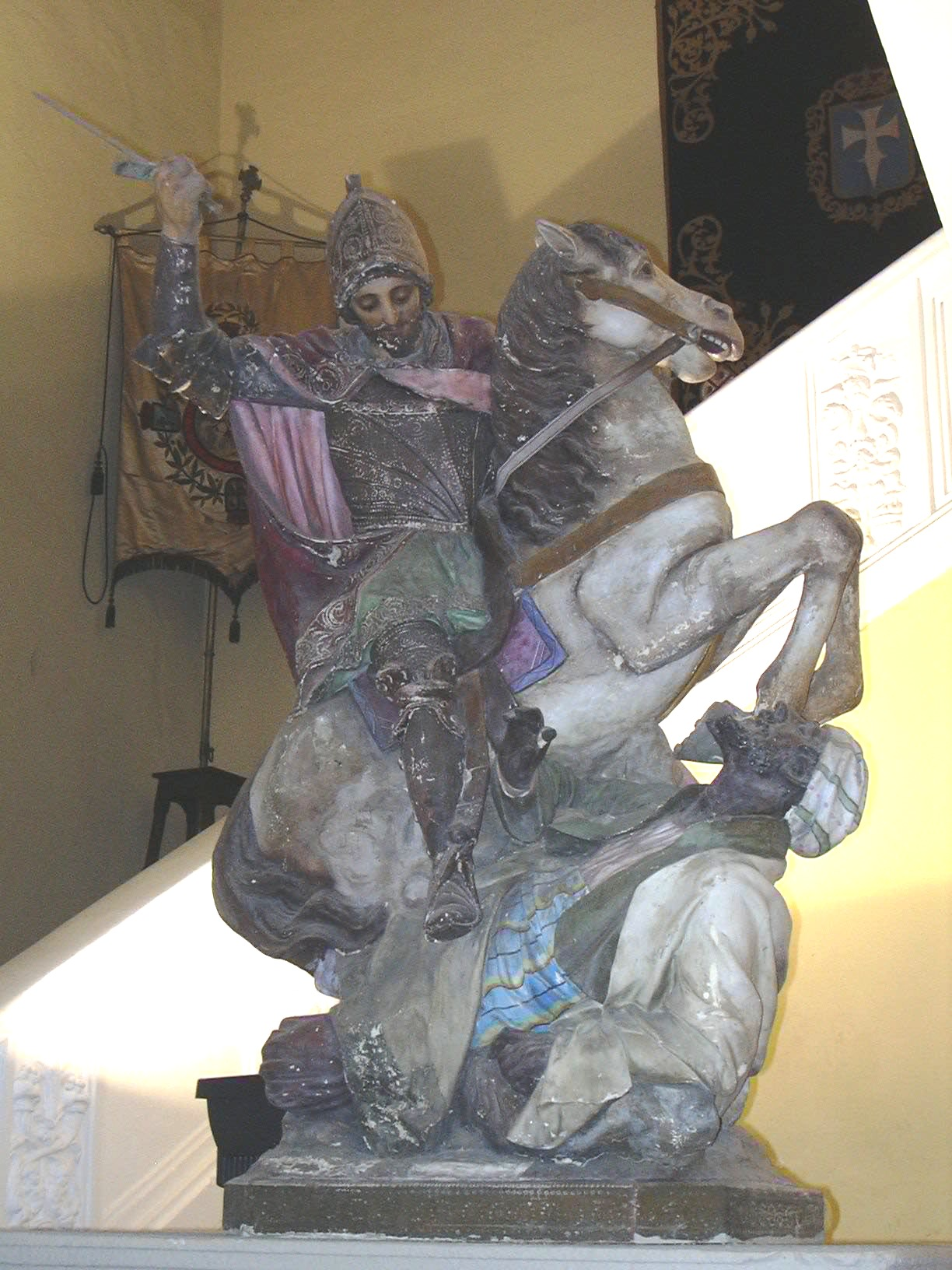 Casa de Miguel Donlope en Zaragoza Casa-palacio renacentista con techumbres mudéjares. Actualmente sede de la Real Maestranza de Caballería de Zaragoza. Estatua de Santiago Matamoros